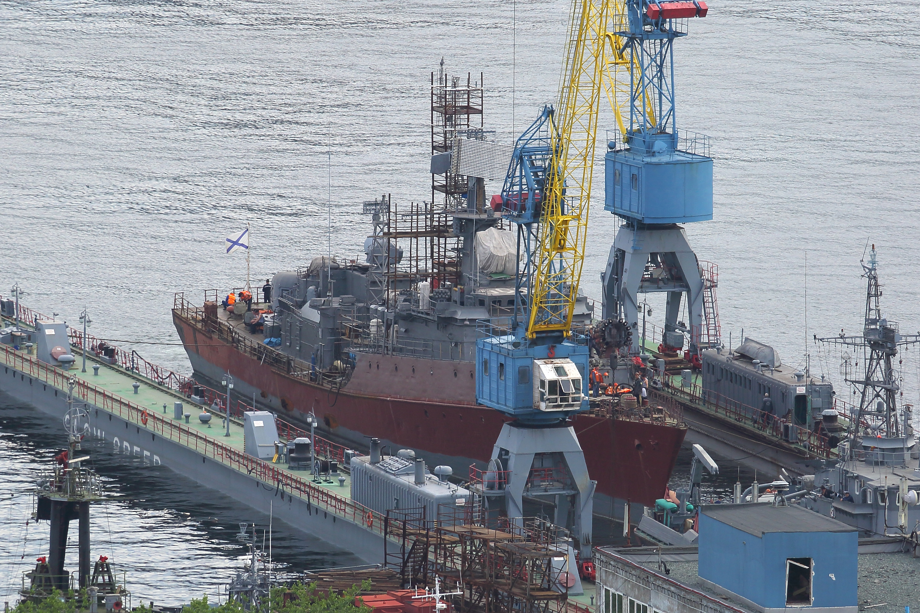 МПК Усть-Илимск в доке Дальзавода 17.07.2015